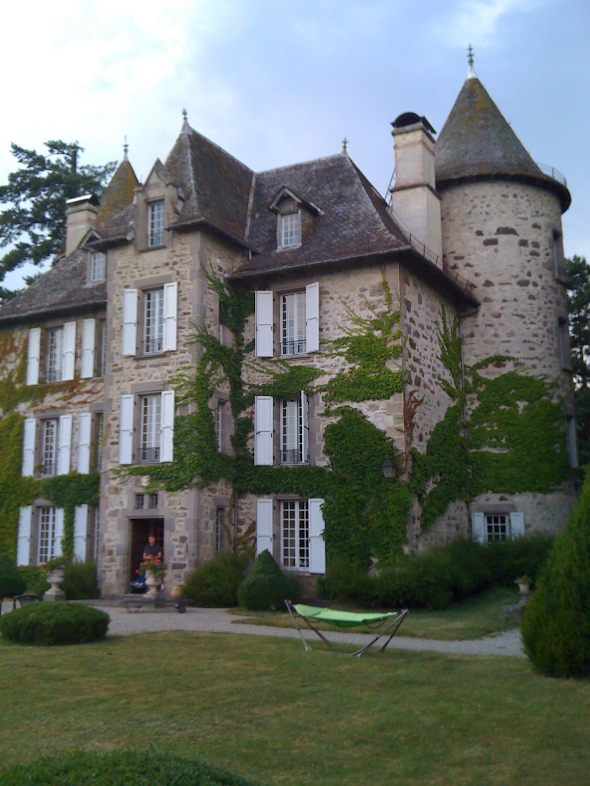 Photo du Château de Carbonat, en été